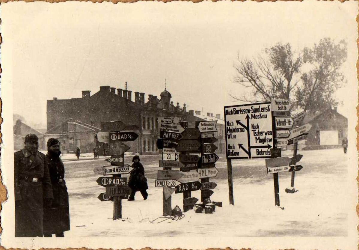 Беларуская (тарашкевіца): Менск (Miensk), Раманаўская Слабада (Ramanaŭskaja Słabada), шлях Каралеўскі (šlach Karaleŭski). Жаночая жыдоўская вучэльня